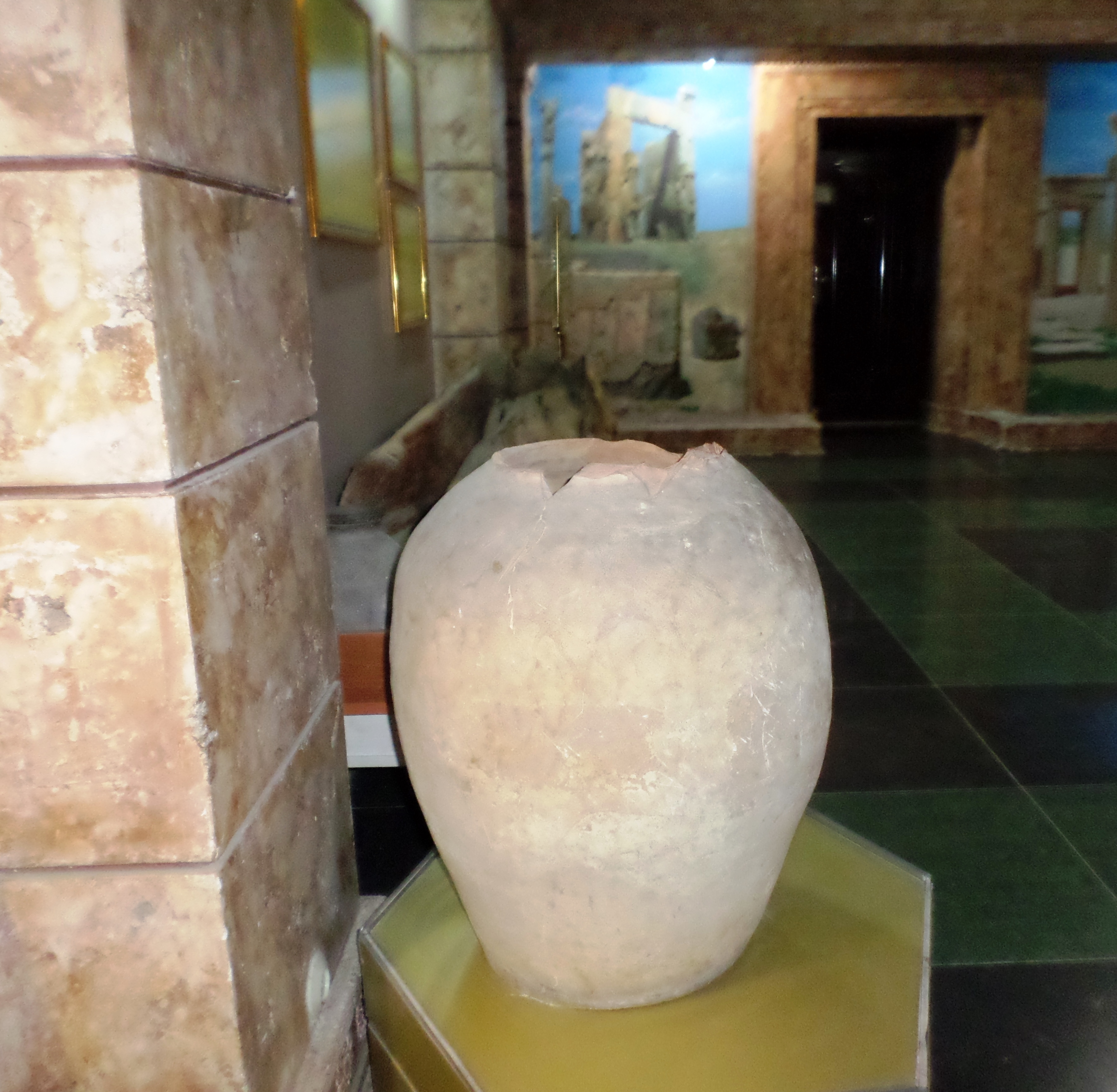 Хум, экспонат в историко-краеведческом музее г. Худжанд, Согдийская область, ТаджикистанТоҷикӣ: Хум,- осорхонаи таърихӣ - кишваршиносии шаҳри Хуҷанд, вилояти Суғд